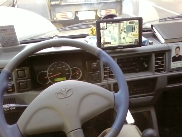 한국 GM 뉴 다마스(2010년식 1월식) 인테리어